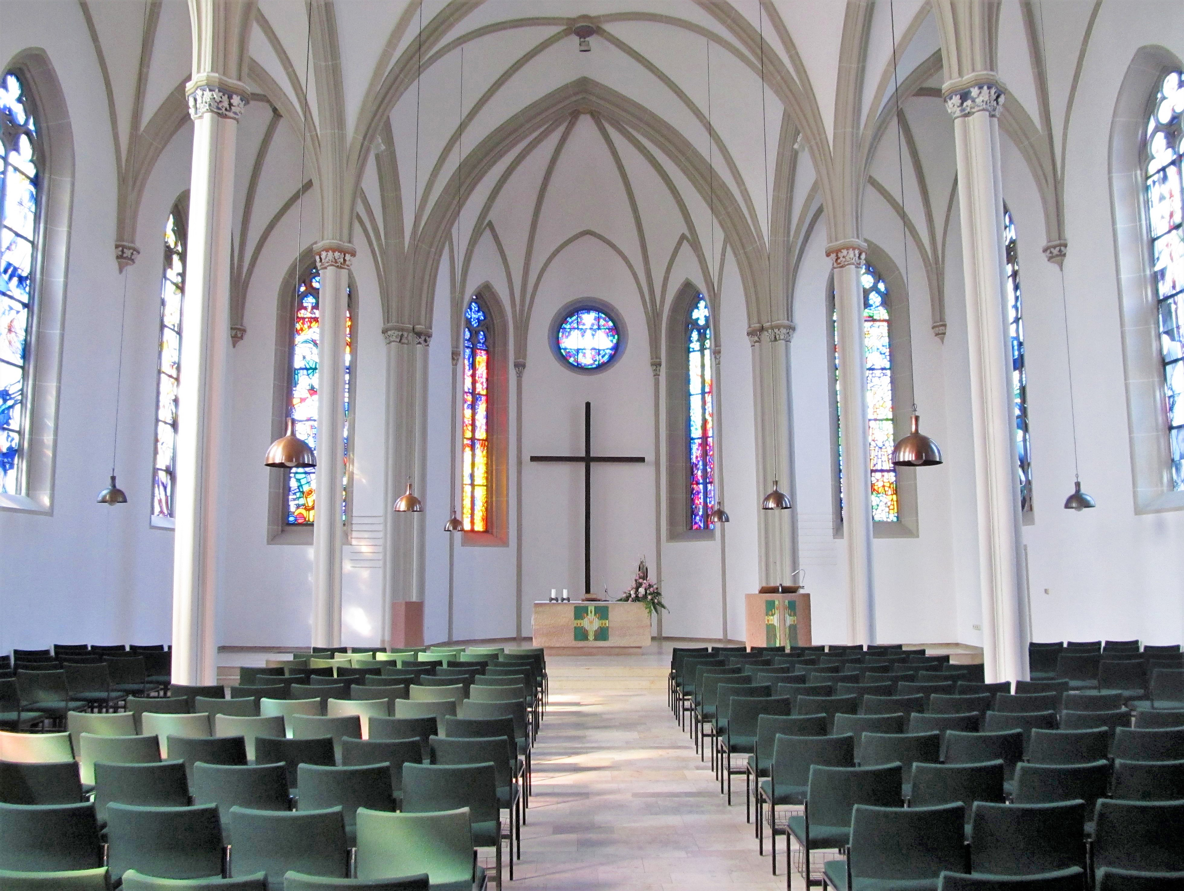 Blick ins Innere der prot. Stadtkirche in Homburg, Saarland